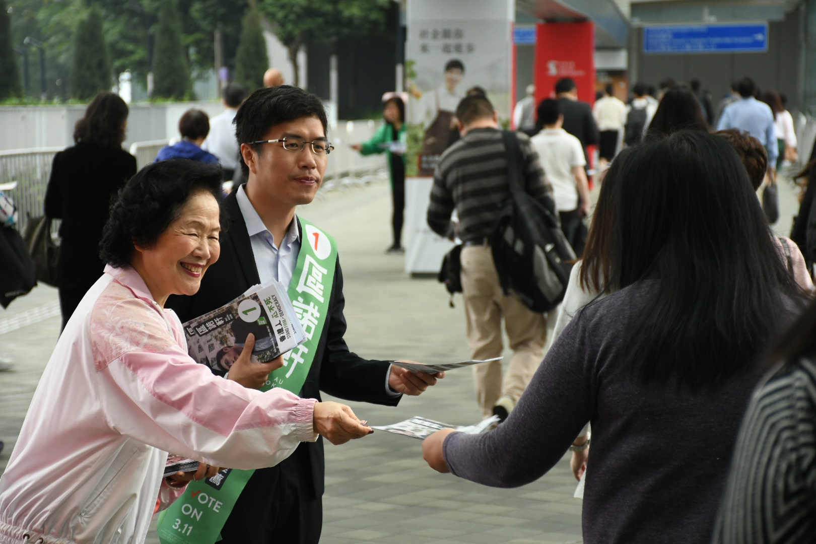 香港前政務司司長陳方安生，為民主派立法會補選港島區候選人區諾軒拉票。